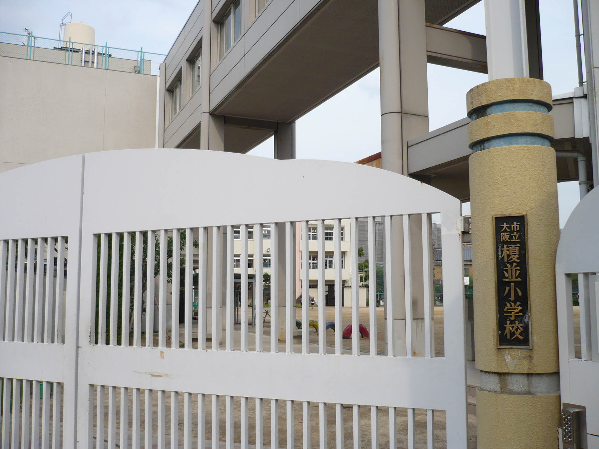 榎並小学校